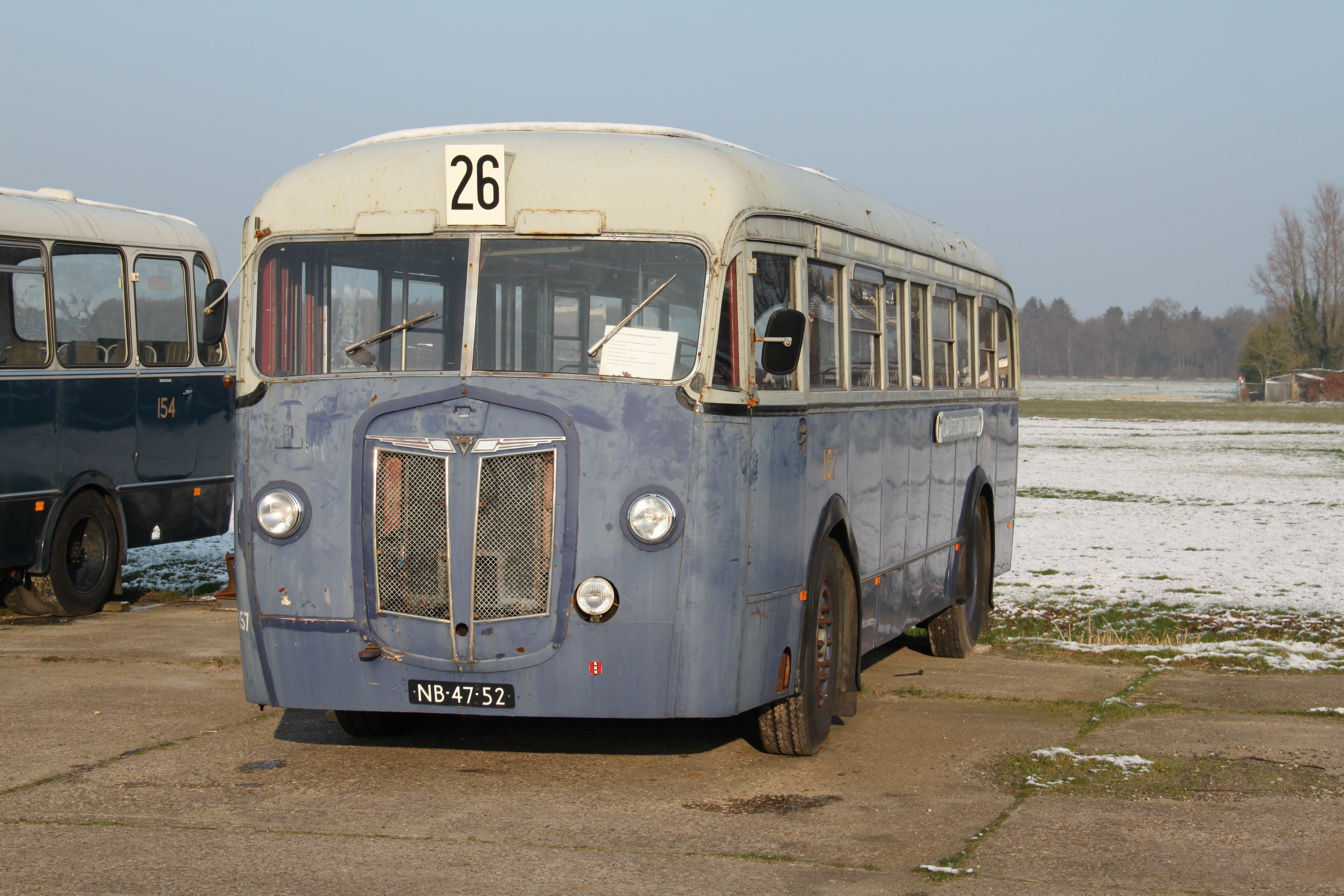 De GVB 157 uit 1941 bij het Nationaal Openbaar Vervoer museum in Ouwsterhaule. Inmiddels is de bus overgenomen door de Stichting Veteraan Autobussen.